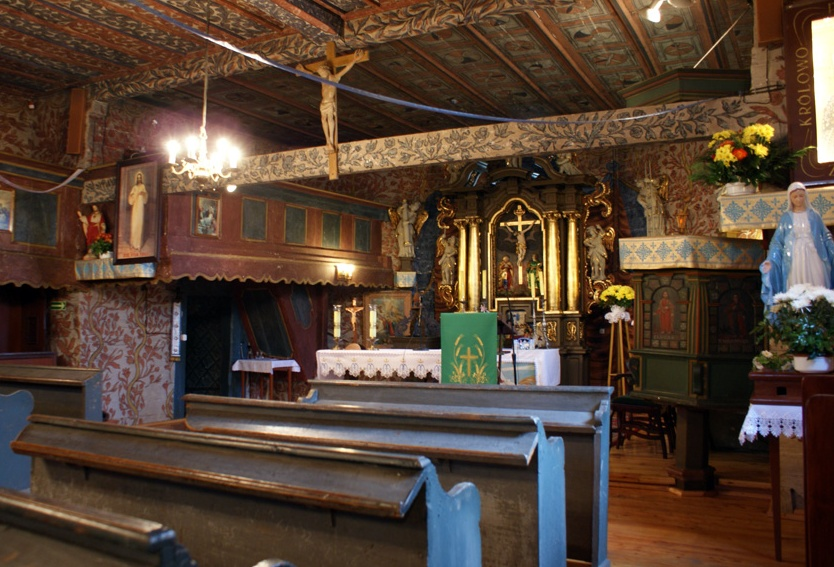 Wnętrze kościoła, widok na prezbiterium